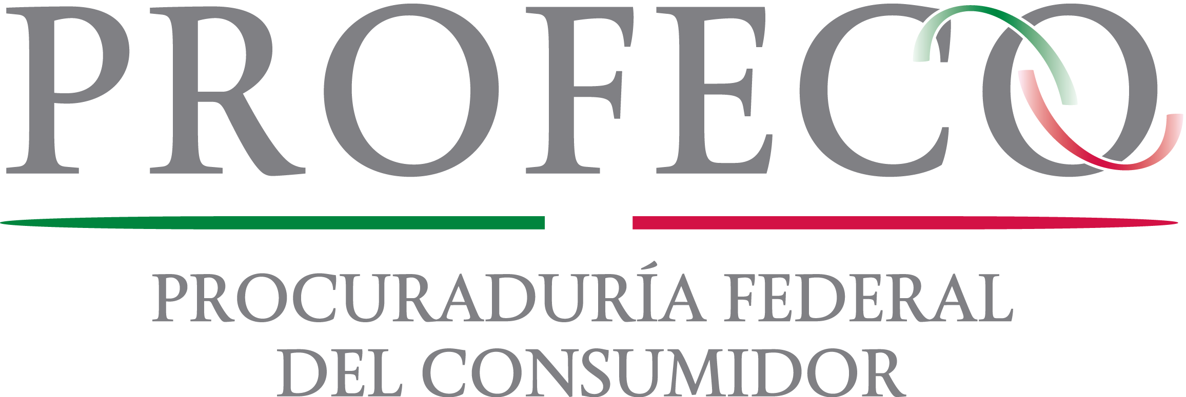 Logotipo oficial de la Procuraduría Federal del Consumidor. Sexenio 2012-2018